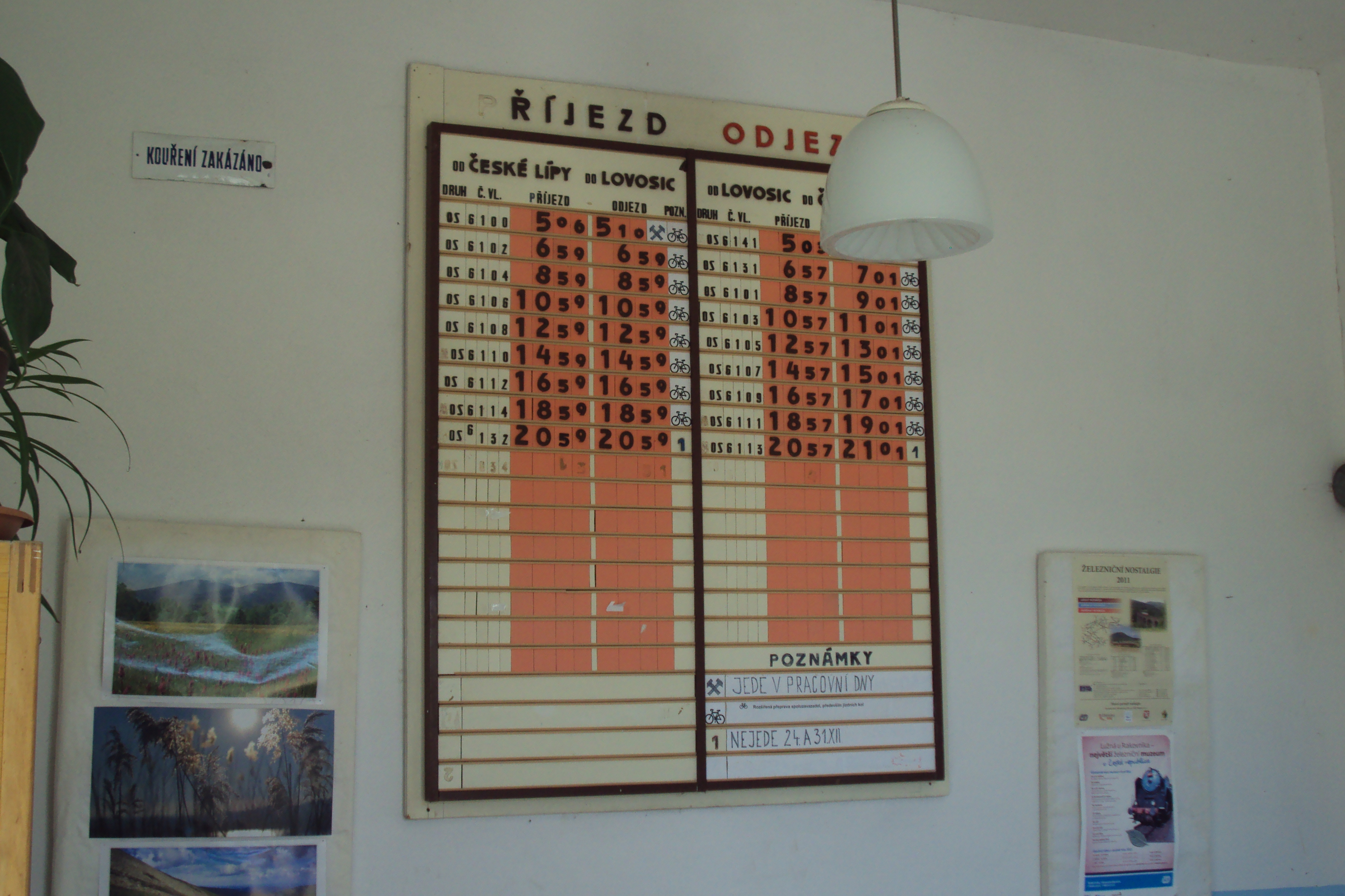 V čekárně nádraží Blíževedly